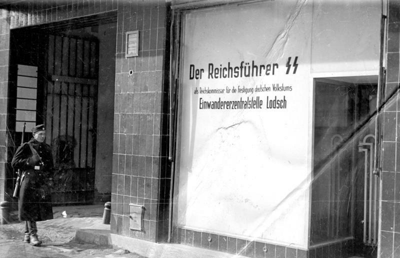 Litzmannstadt, Einwanderer-Zentralstelle Die Einwanderer-Zentralstelle Nord-Ost in Litzmannstadt [Polen, Lodz.- Gebäude der Einwanderer-Zentralstelle Nord-Ost, Eingang mit Aufschrift "Der Reichsführer SS als Reichskommissar für die Festigung deutschen Volkstums"] Information added by Wikimedia users.